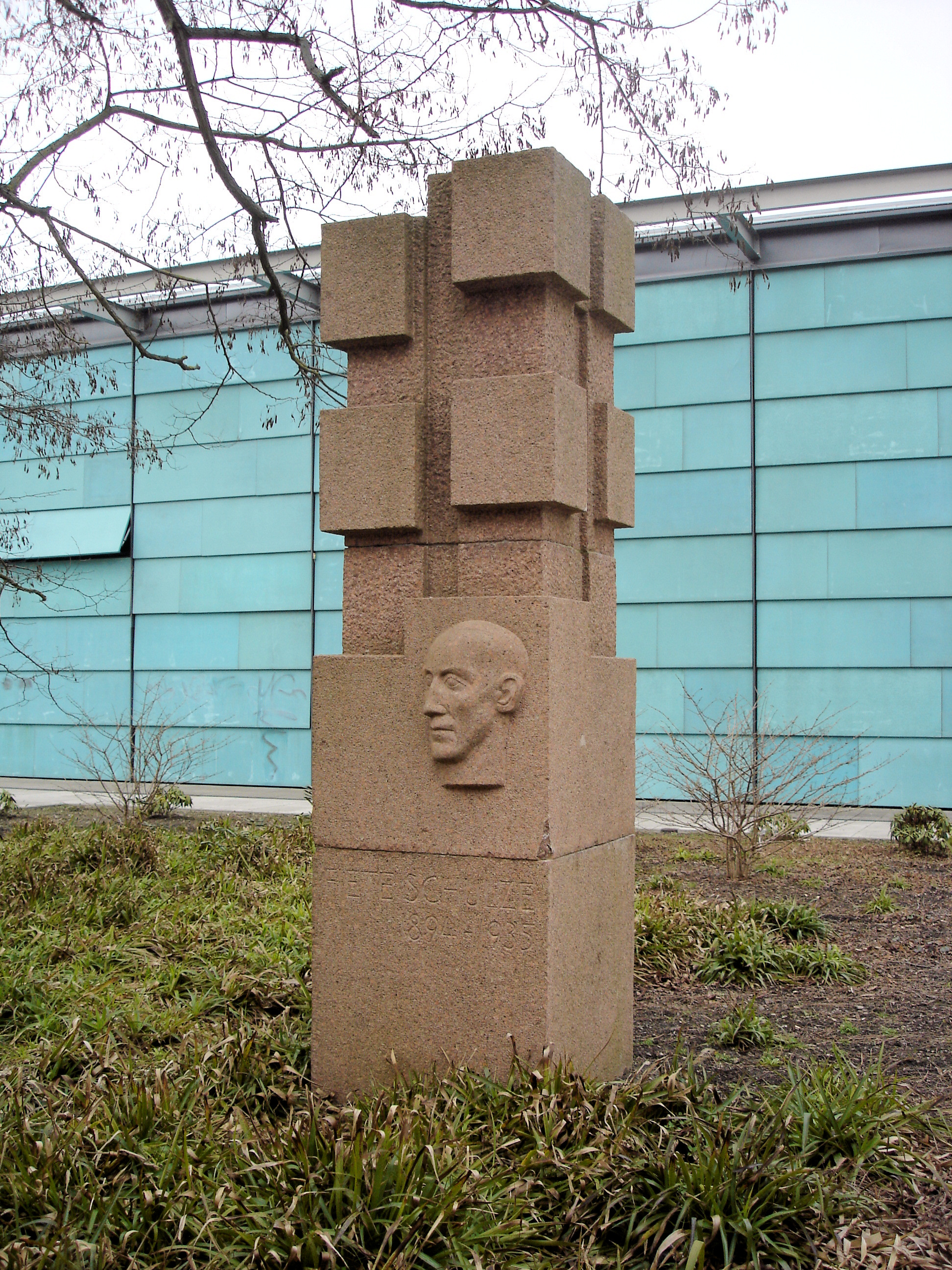 Gedenkstein für Fiete Schulze in Rostock von Wieland Schmiedel 1969